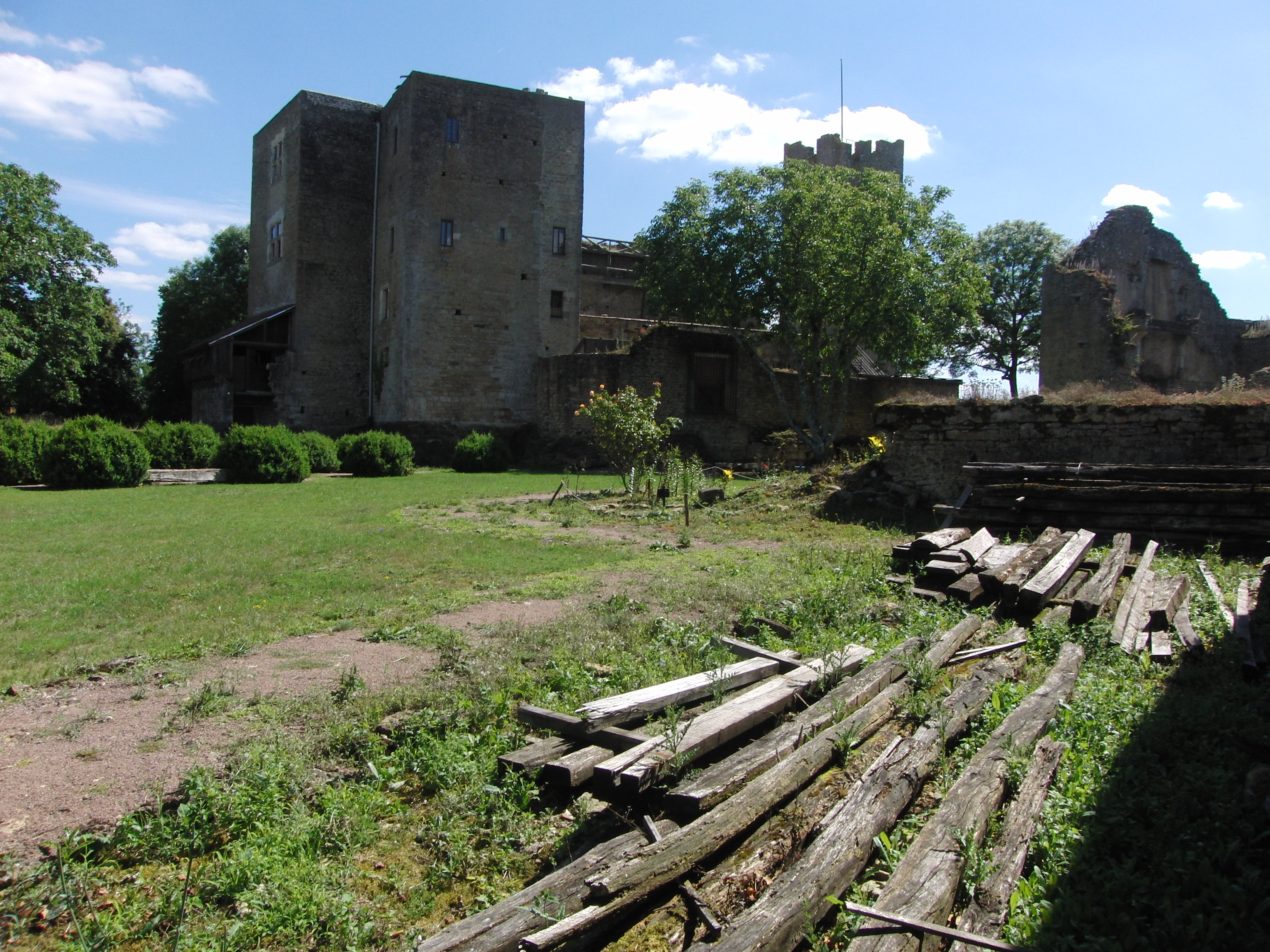 Château de Thil, Vic-sous-Thil, Côte d'Or, France .